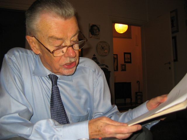 Jan Kułakowski (1930-2011), Polish politician